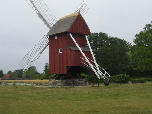 Kappel mølle, foto af Holger Villadsen, som har overdraget rettighederne til mig